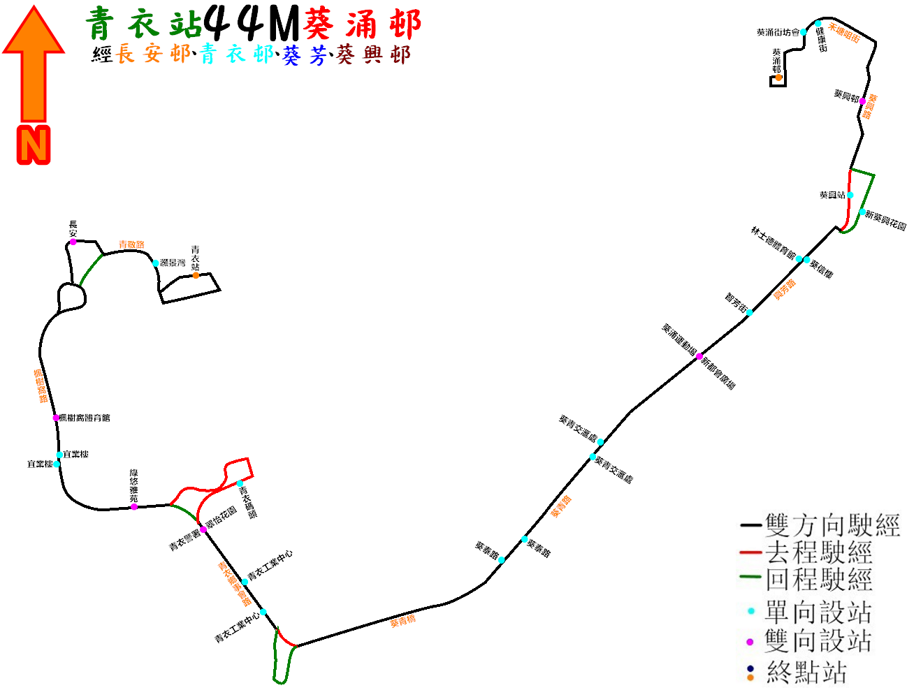 中文（香港）: 九巴44M線的走線圖